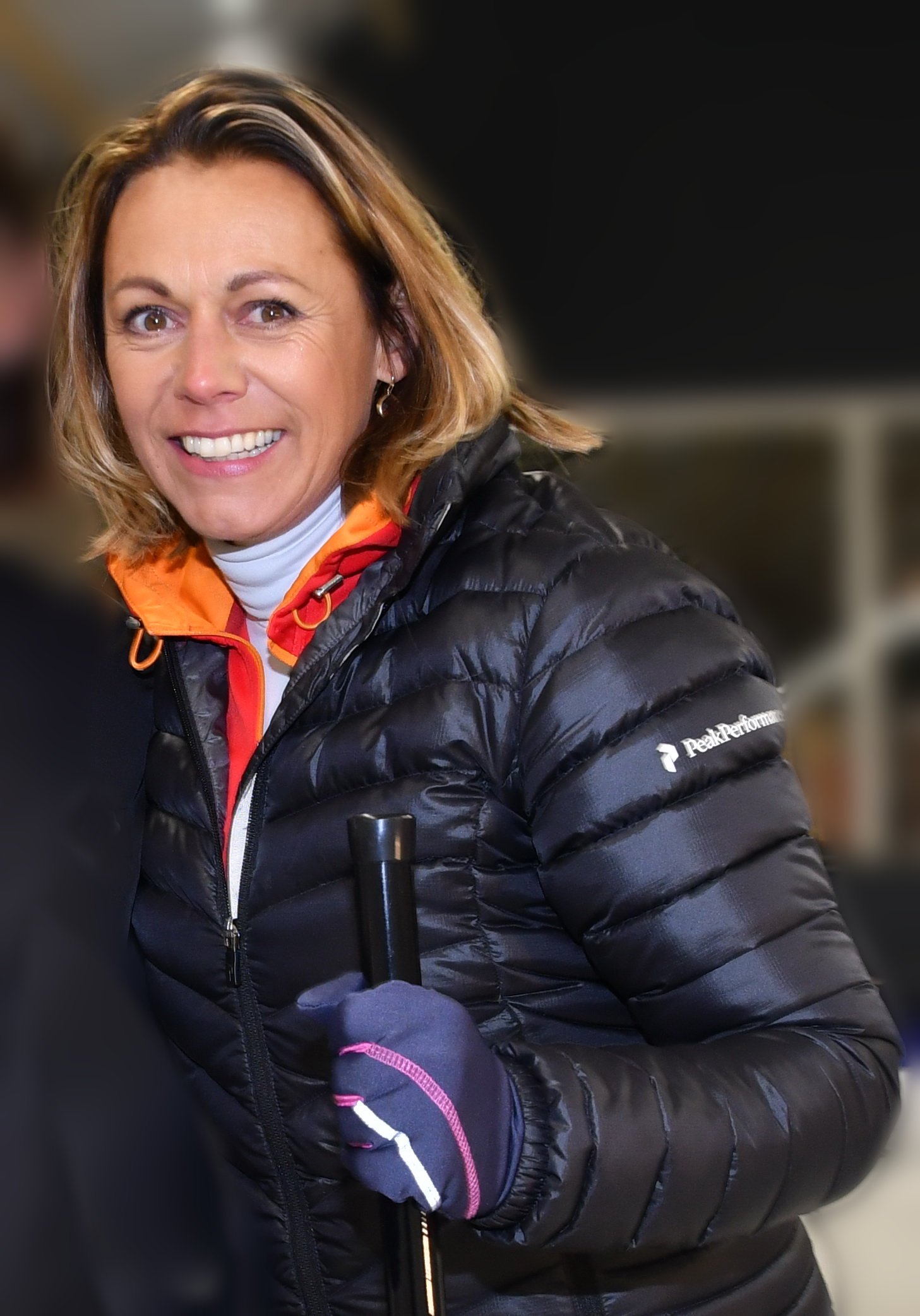 Sabine Appelmans tijdens een Curling oefenwedstrijd in Elewijt (Vlaams-Brabant)